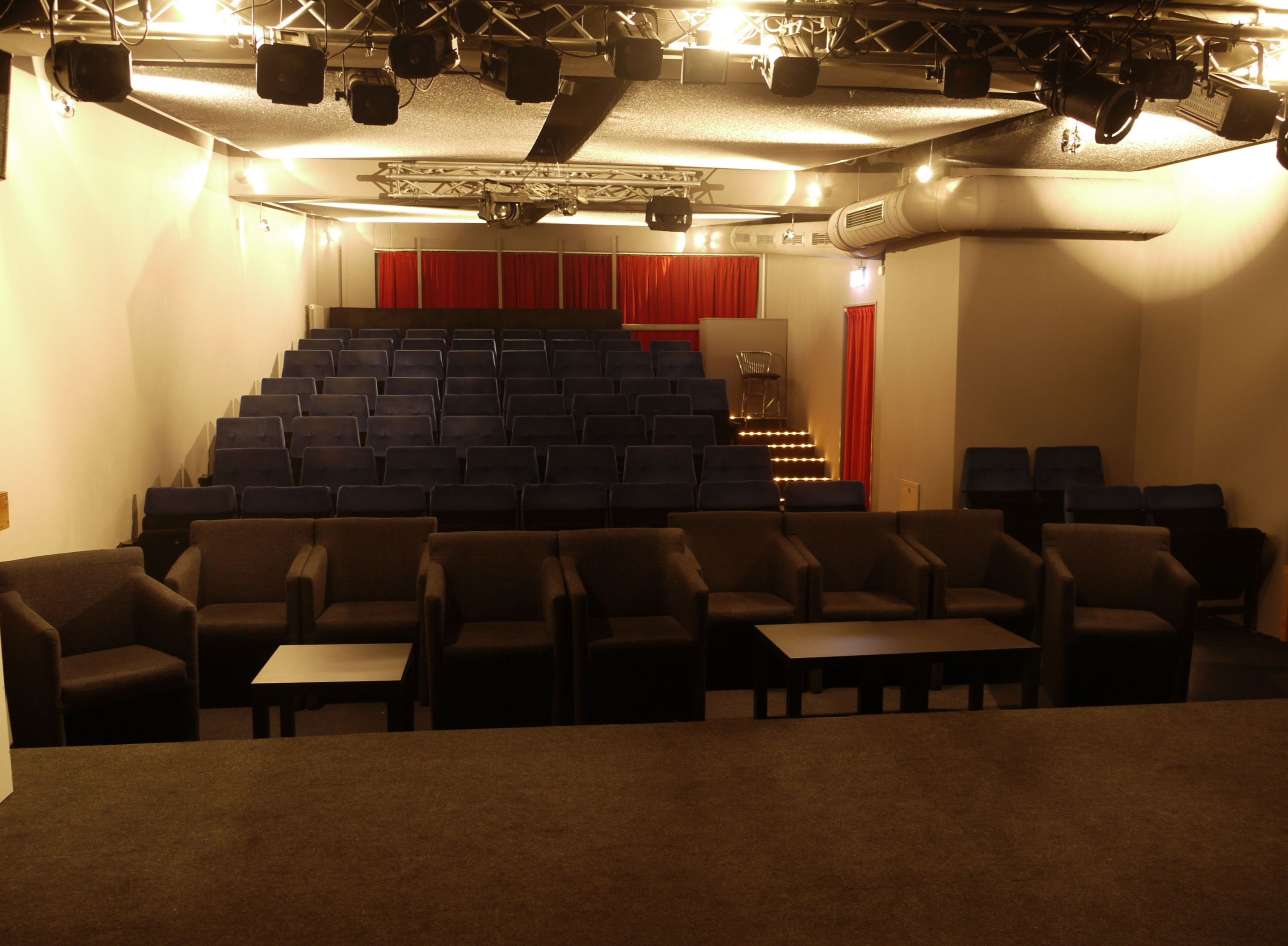 Der Zuschauerraum des Theater Neu-Ulm